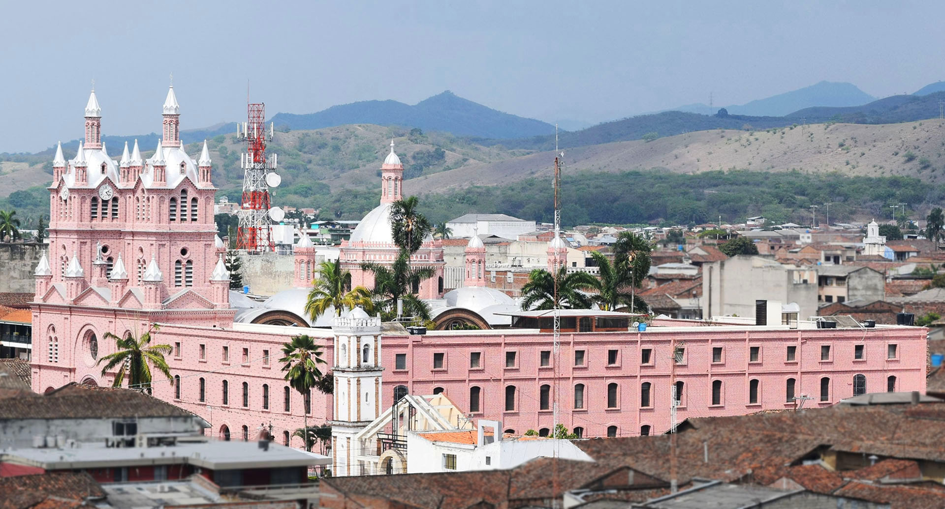 Vista de la Basílica del Señor de los Milagros de Buga, Colombia.